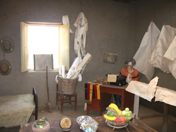 Bildbeschreibung: Wachsfigur im Museum Maria Reiche bei Nasca/Peru Quelle: eigene Aufnahme Fotograf: Alexander Fiebrandt Datum: Oktober 2004 andere Versionen